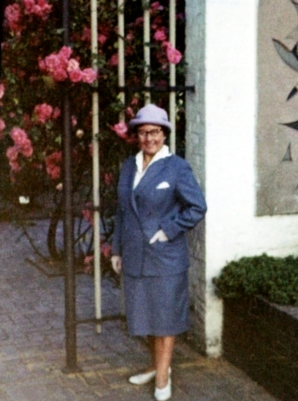 Porträt Bengta Bischoff